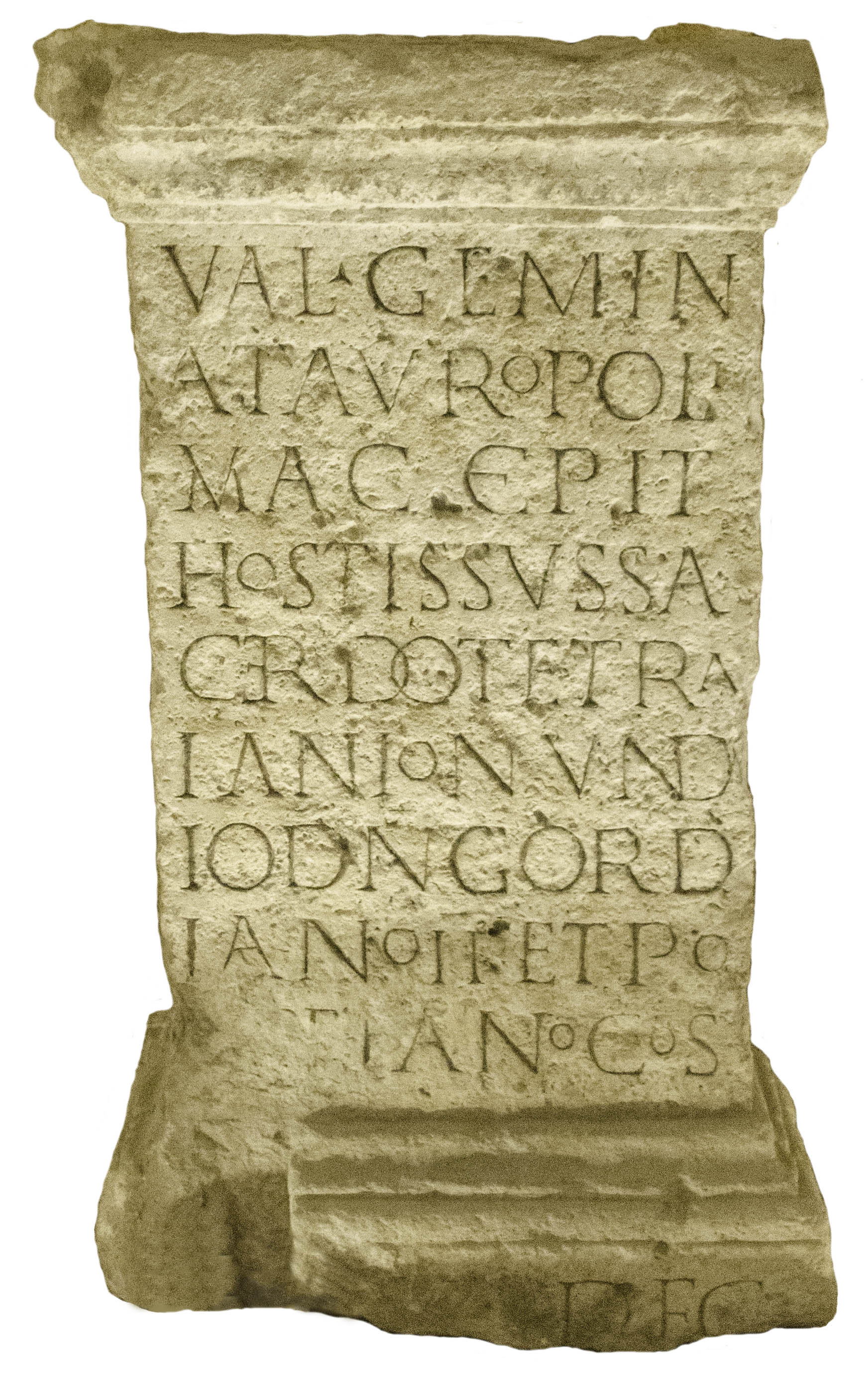 Autel taurobolique de Valeria Gemina, 241 ap. JC. Musée Eugène-Camoreyt, Lectoure, Gers, France.